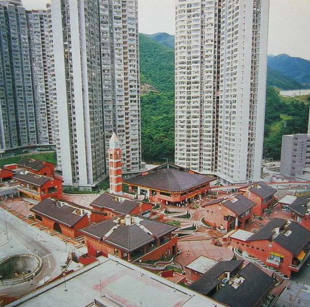 HK Kwong Yuen Estate